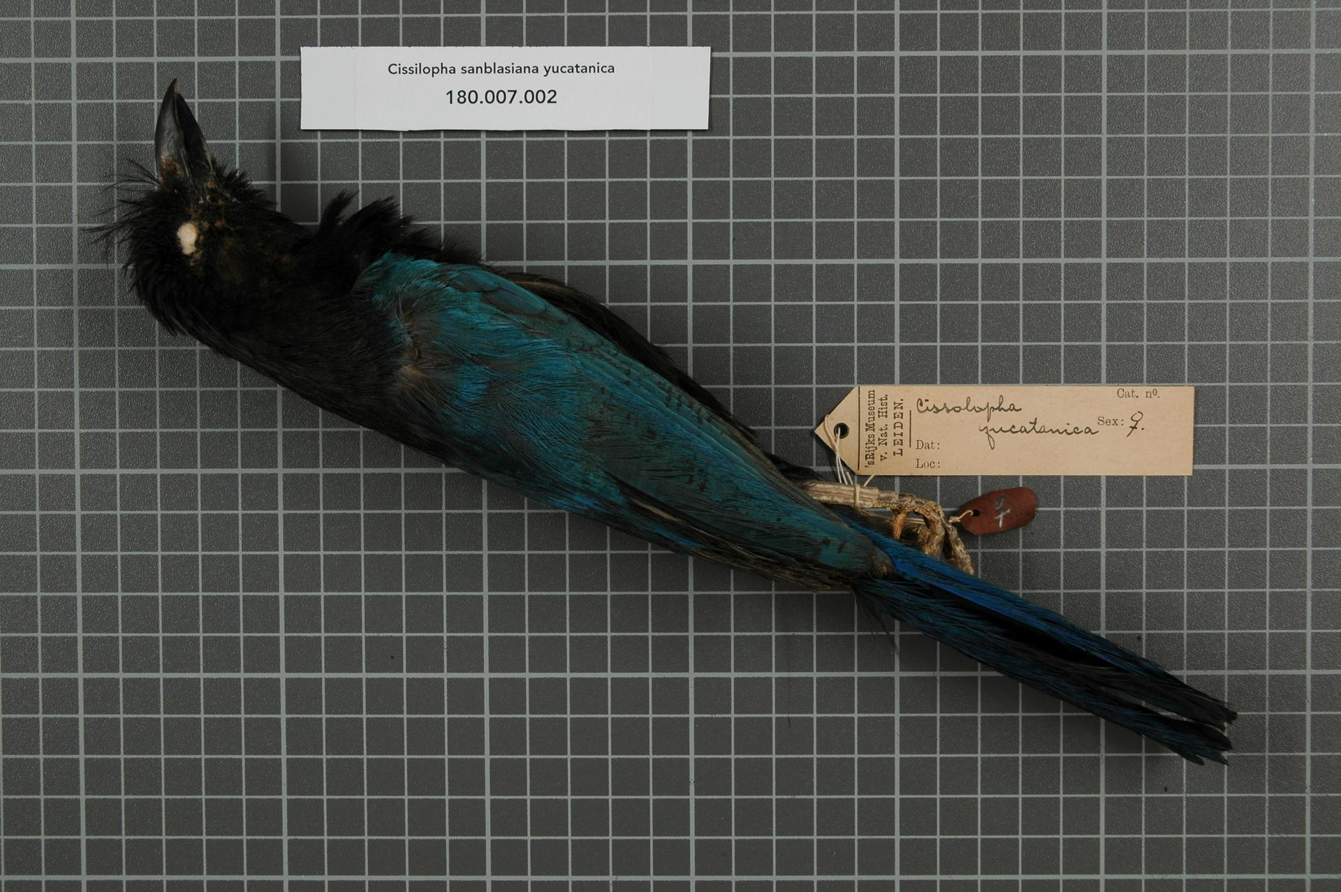 Cissilopha sanblasiana yucatanica (Dubois, 1875)